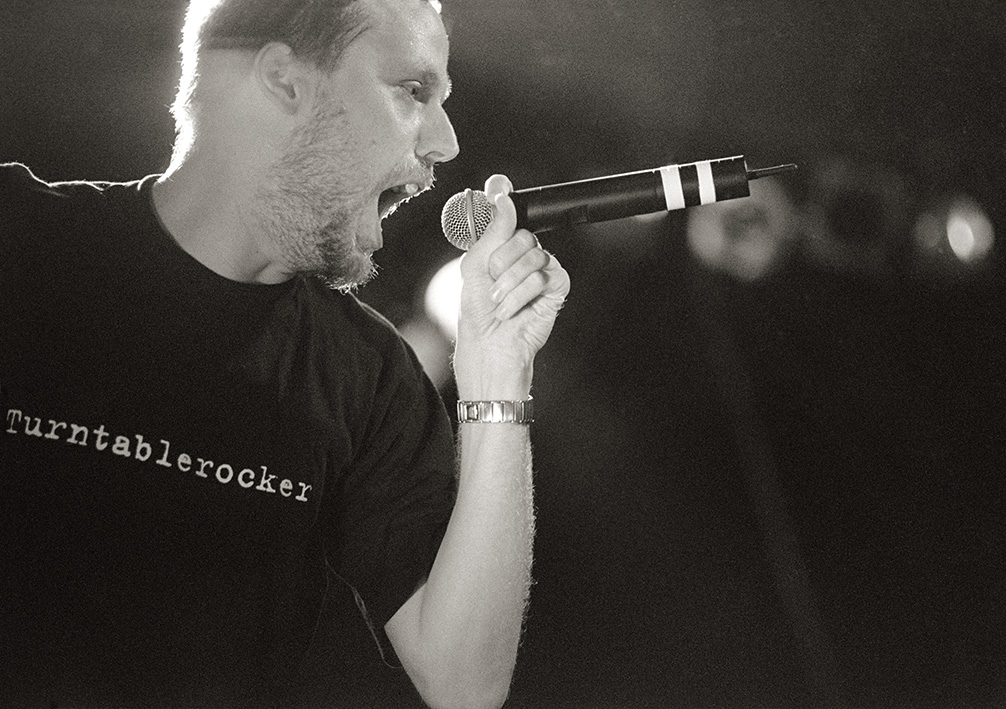 1998 in Schenefeld